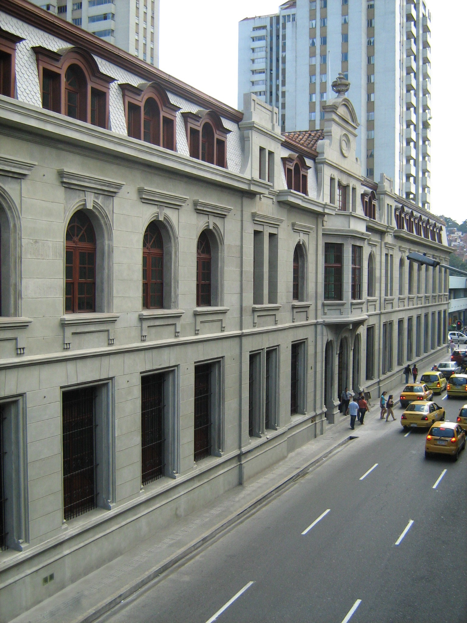 Edificio de la antigua Escuela de Derecho, diseñado por el arquitecto belga Agustín Goovaerts. Medellín, Colombia